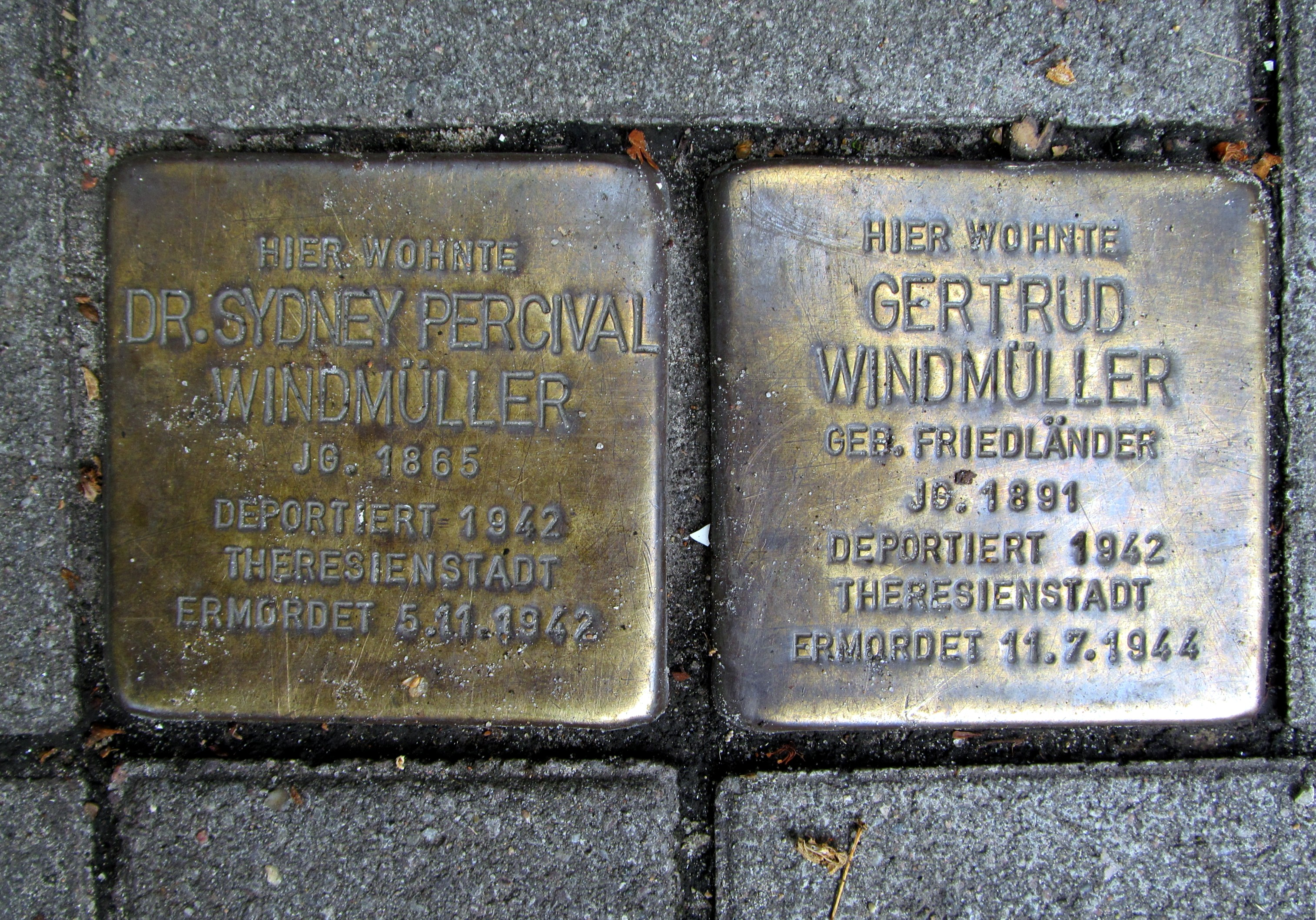 Stolperstein für Gertrud und Sydney Percival Windmüller, Hirschgraben 58 in Hamburg-Hamm